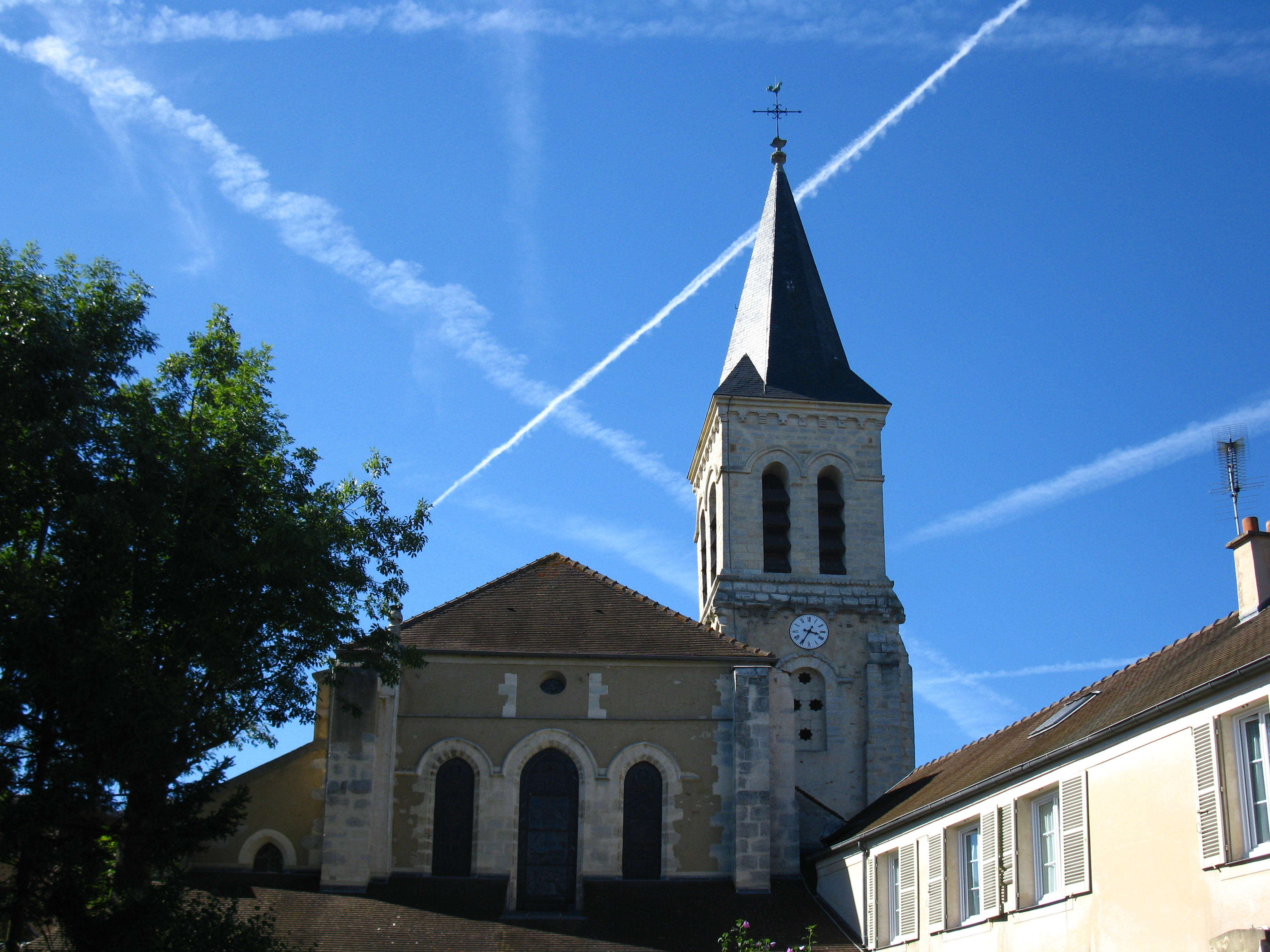 Côté est de l'église Notre-Dame de Villecresnes (94) (chevet plat et clocher)